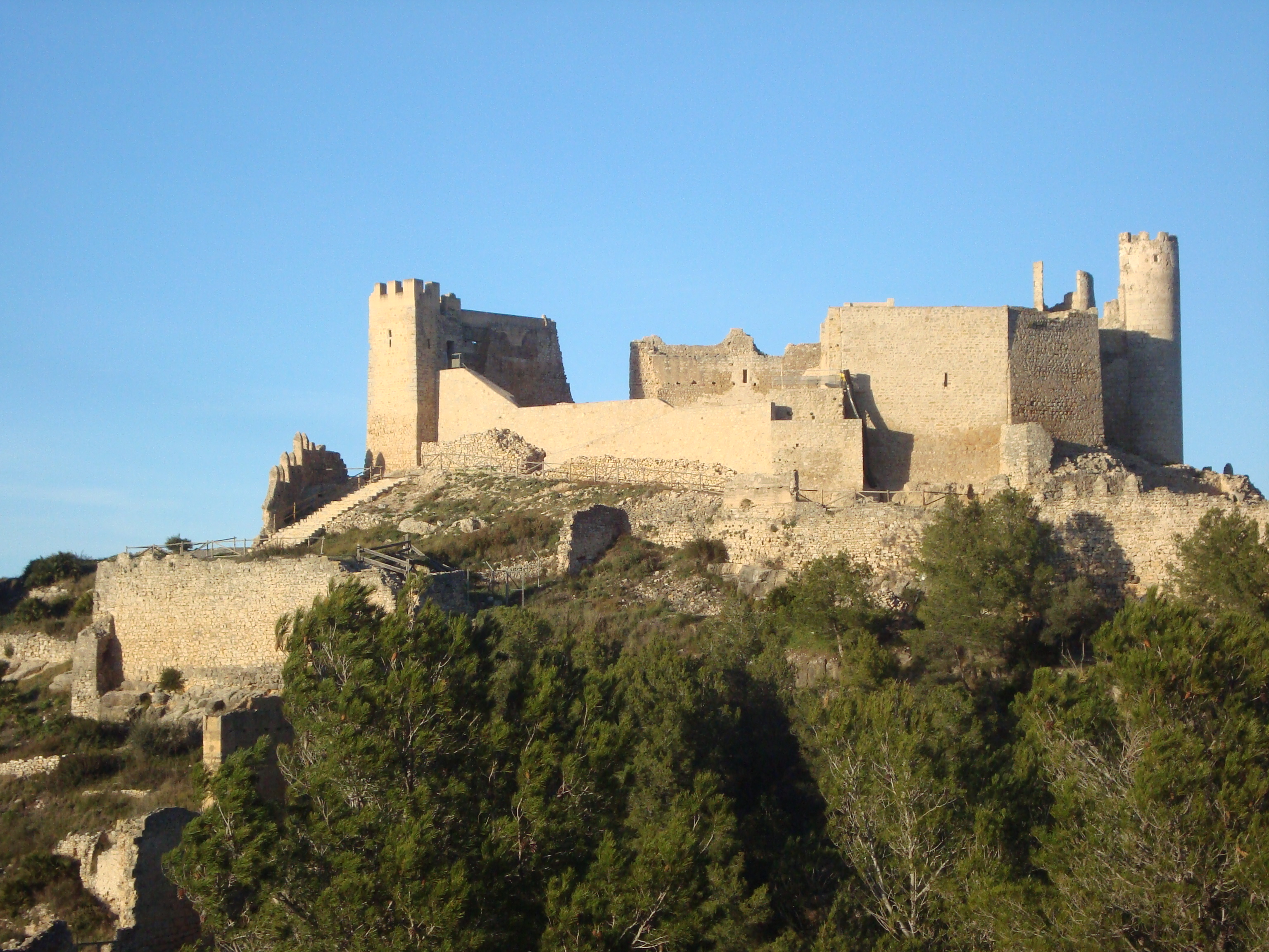 El Castillo de Chivert es una antigua fortaleza emplazada en la cima de un monte dominando el llano de la Foia o valle de Alcalà y la sierra de Irta. Conserva dos partes constructivas bien diferenciadas: la árabe y la cristiana, son dos castillos en uno. La construcción árabe comprende el recinto amurallado externo, obra de los siglos X–XI en la que destacan algunos grandes lienzos en tapial, con remates de merlones y que se abría por la puerta del Albácar. En su interior, se descubren todavía buenas muestras de arquitectura doméstica musulmana. Muy interesante es la inscripción árabe en uno de sus muros cuya traducción viene a decir "para el reencuentro con Dios". En la parte más alta del castillo islámico se construyó la fortaleza templaria, del siglo XIII .